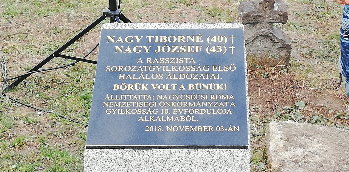 Nagycsécsi romagyilkosság (2008) emléktábla